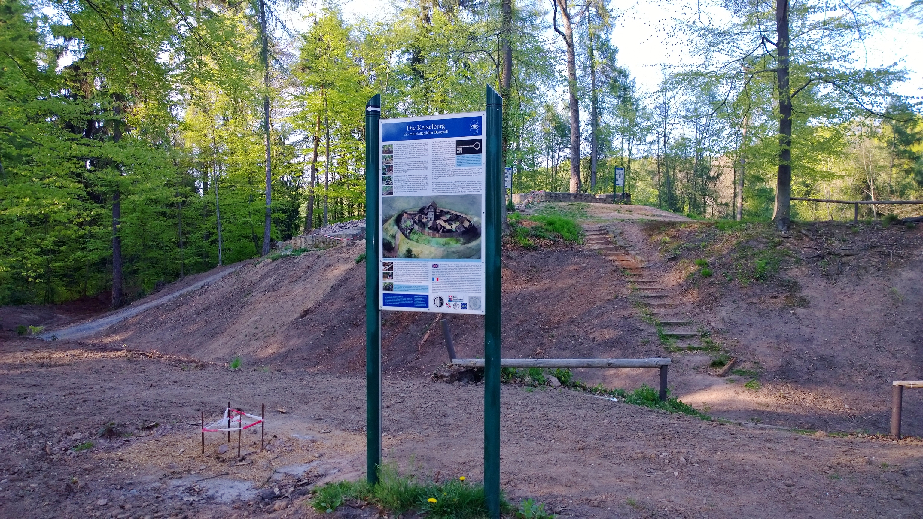 Die Ketzelburg vom heutigen Zugang her gesehen.